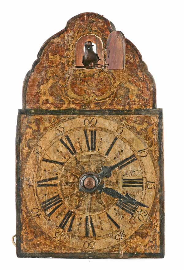 Kuckucksuhr mit Holzraederwerk, bezeichnet Johannes Wildi, Eisenbach, um 1780 (Deutsches Uhrenmuseum, Inv. 2008-024)